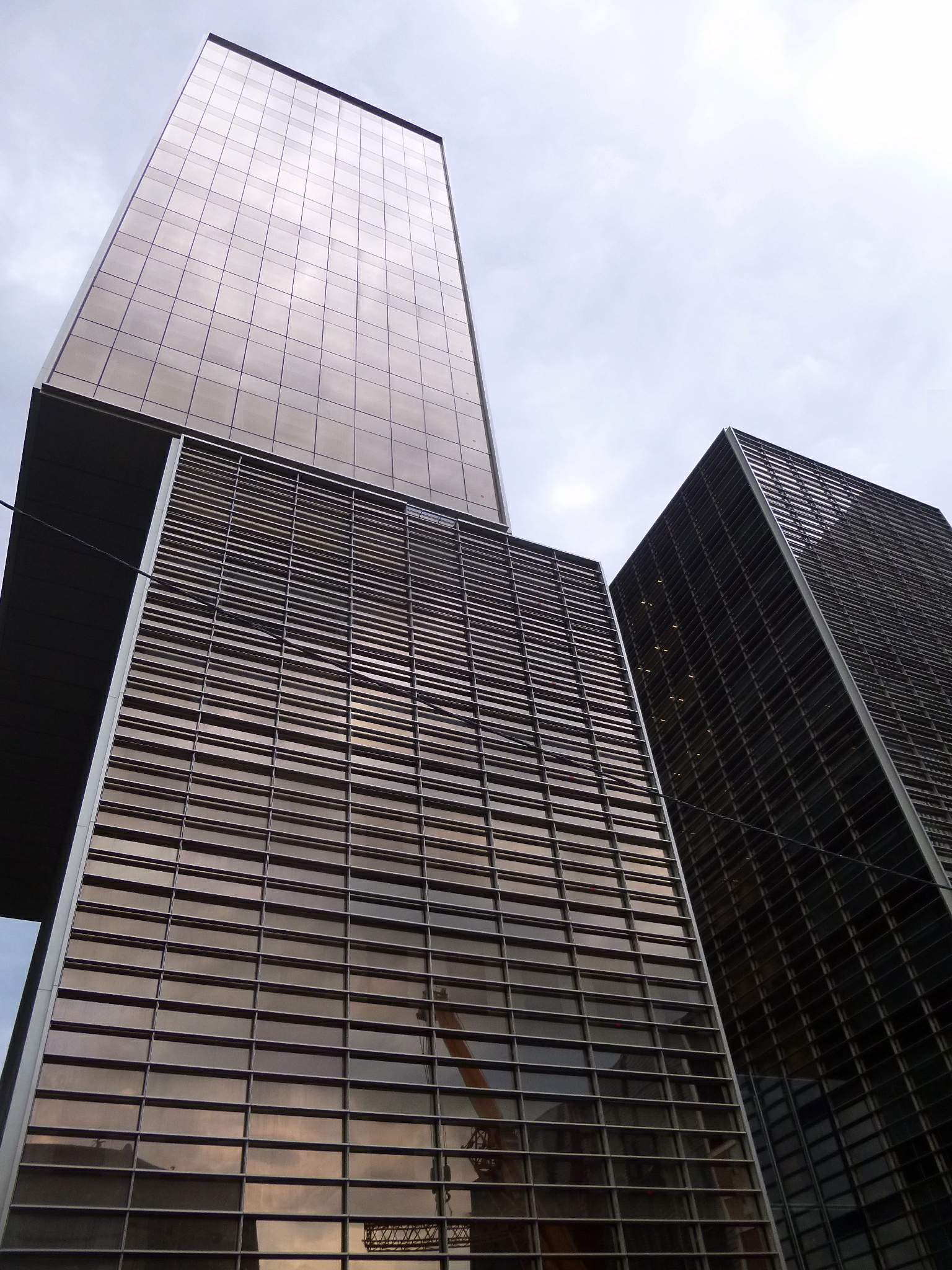 Barcelona - Sede de Cuatrecasas Abogados (Av. Diagonal 191-195